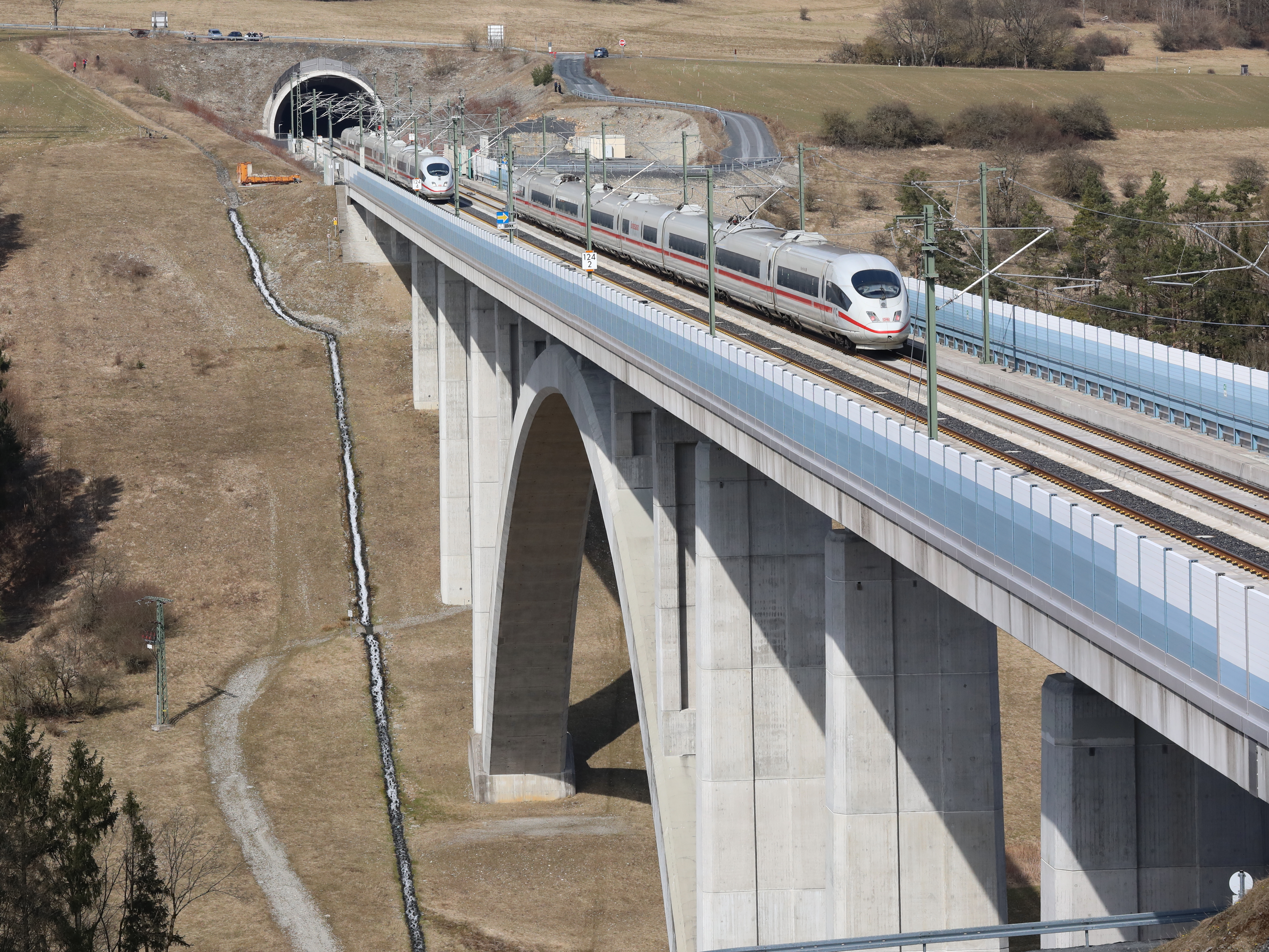 Talbrücke Truckenthal